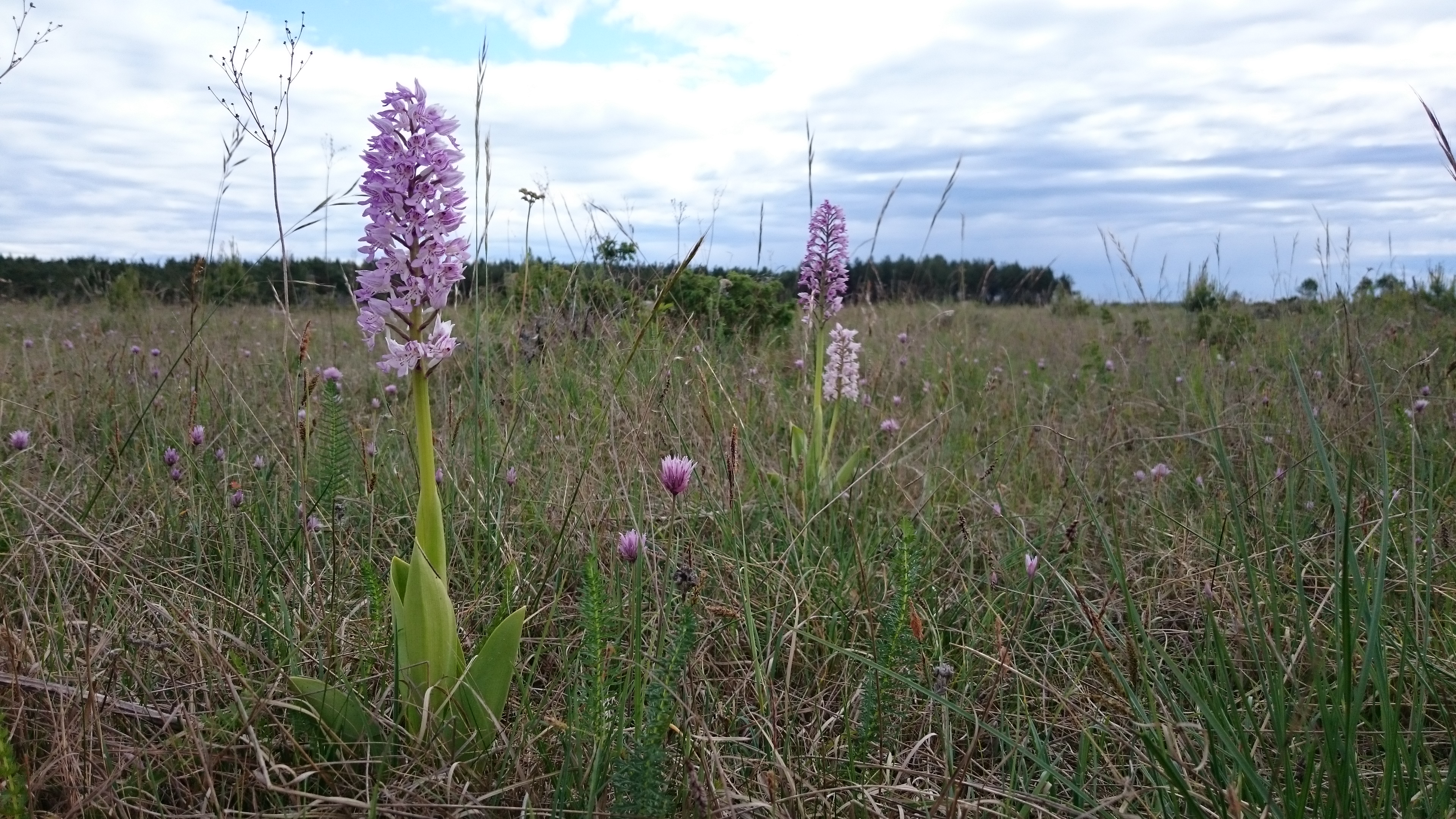 Sarve loopealne Hiiumaal, hallkäpad